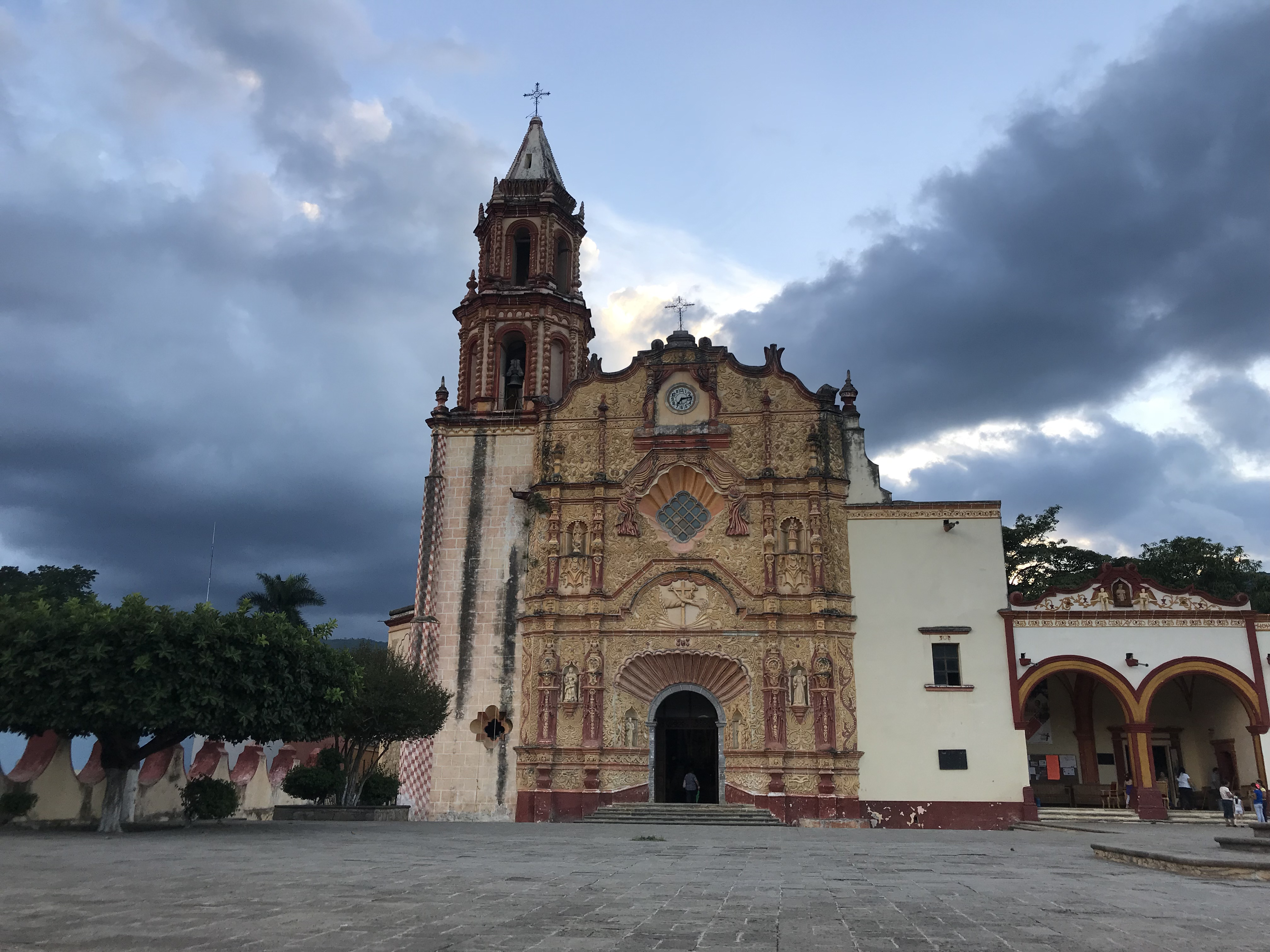 Foto de la Mision Santiago de Apostol, con vista frontal en atardecer